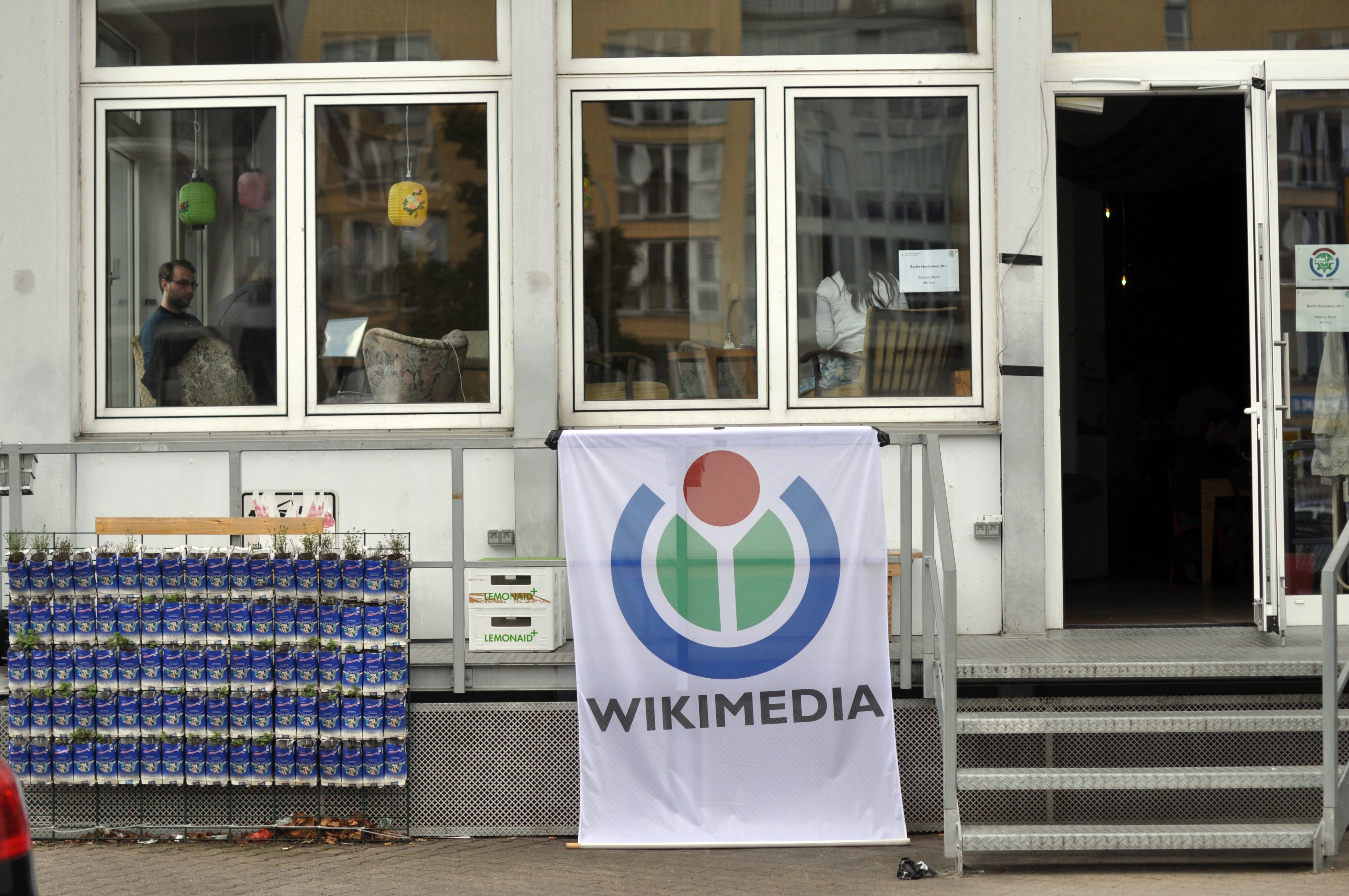 Hackathon 2011 Berlin